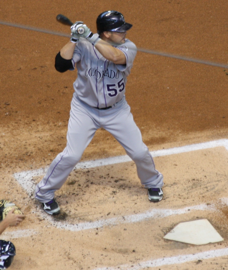 Colorado Rockies player Ramón Hernández.